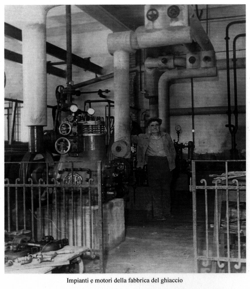 Impianti e motori della fabbrica del ghiaccio